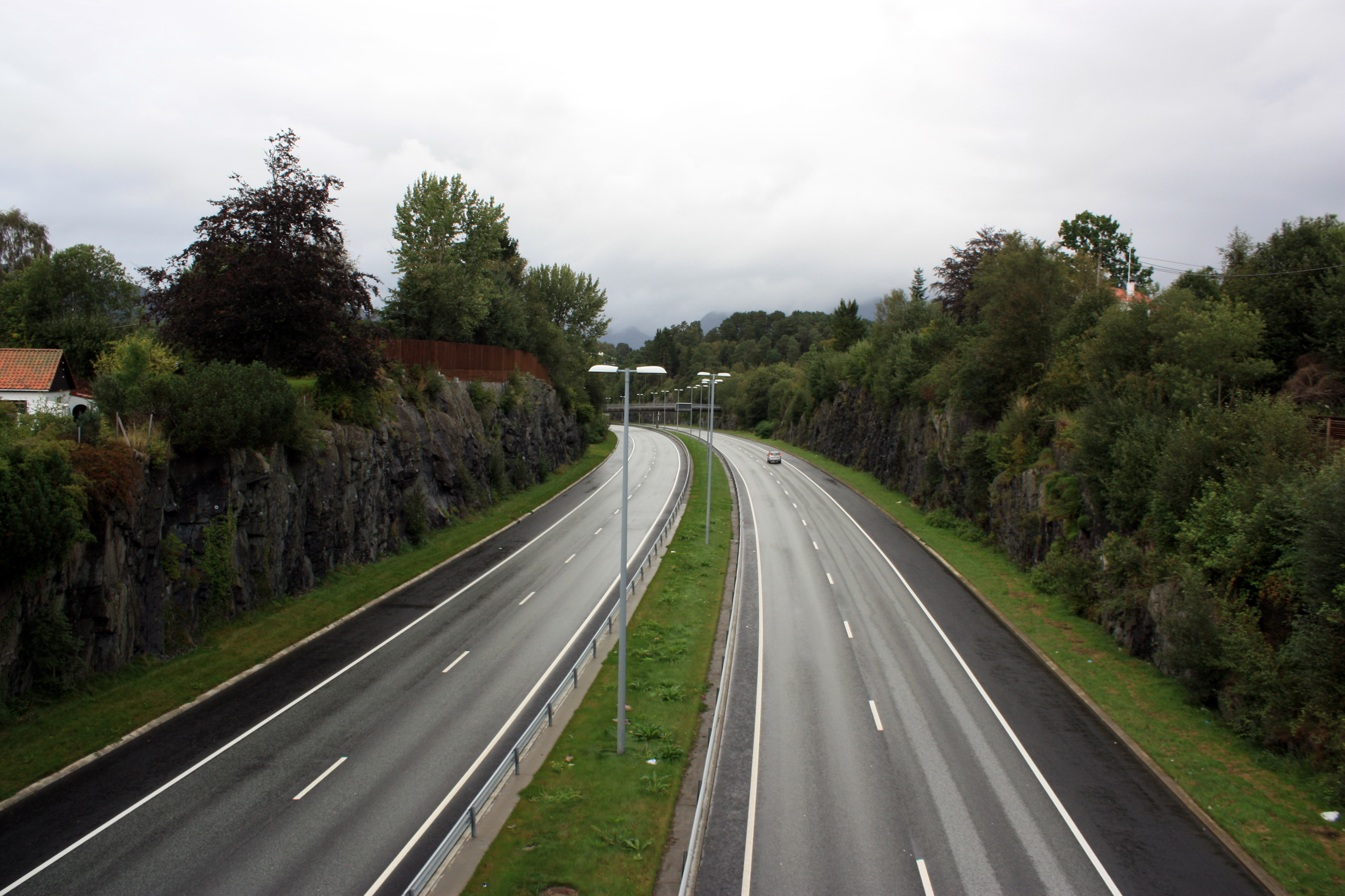 Fritz C. Riebers veg, Fana, Bergen.